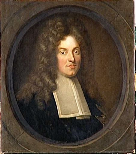 Portrait de Jean-Baptiste Colbert de Seignelay (1651-1690), secrétaire d'Etat de la Marine sous Louis XIV